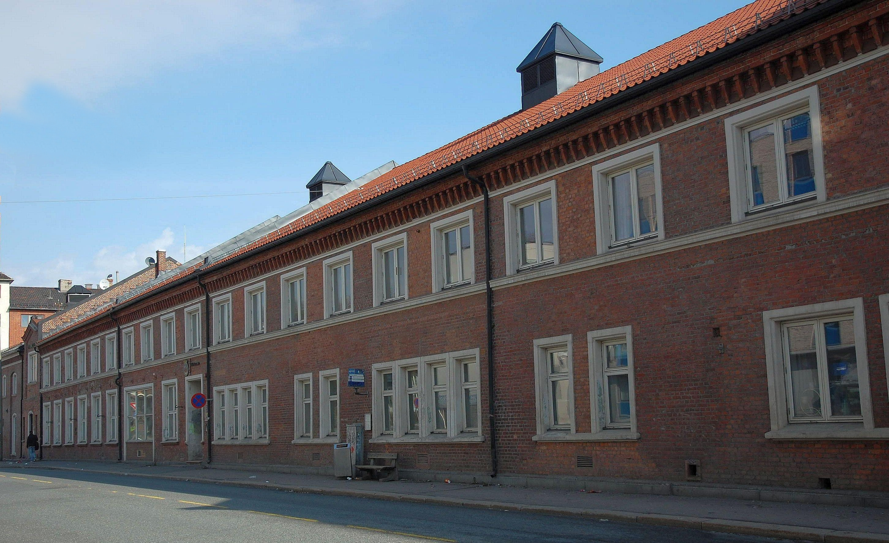 Maridalsveien 3 i Oslo, tidligere Sosialsentralen